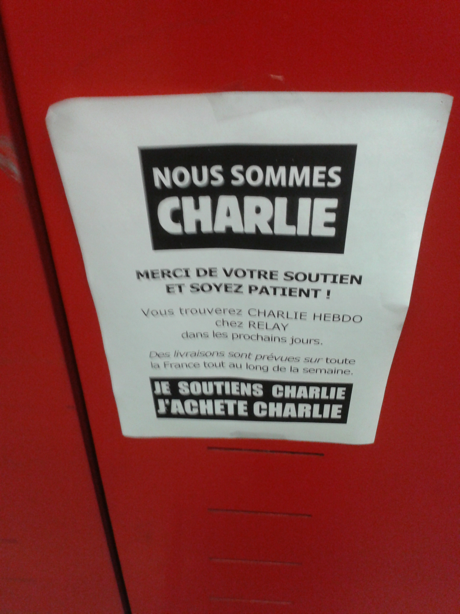 Affichette dans un kiosque francilien, annonçant que le numéro 1178 de Charlie Hebdo est en rupture de stock.